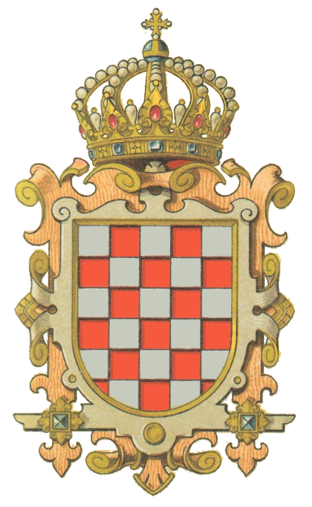 Wappen des Königreichs Croatien & Slavonien